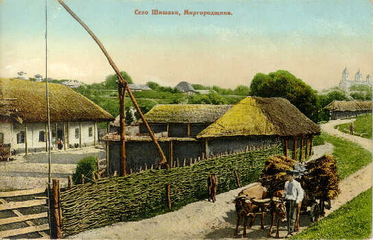 Cело Шишаки, Миргородщина, 1910